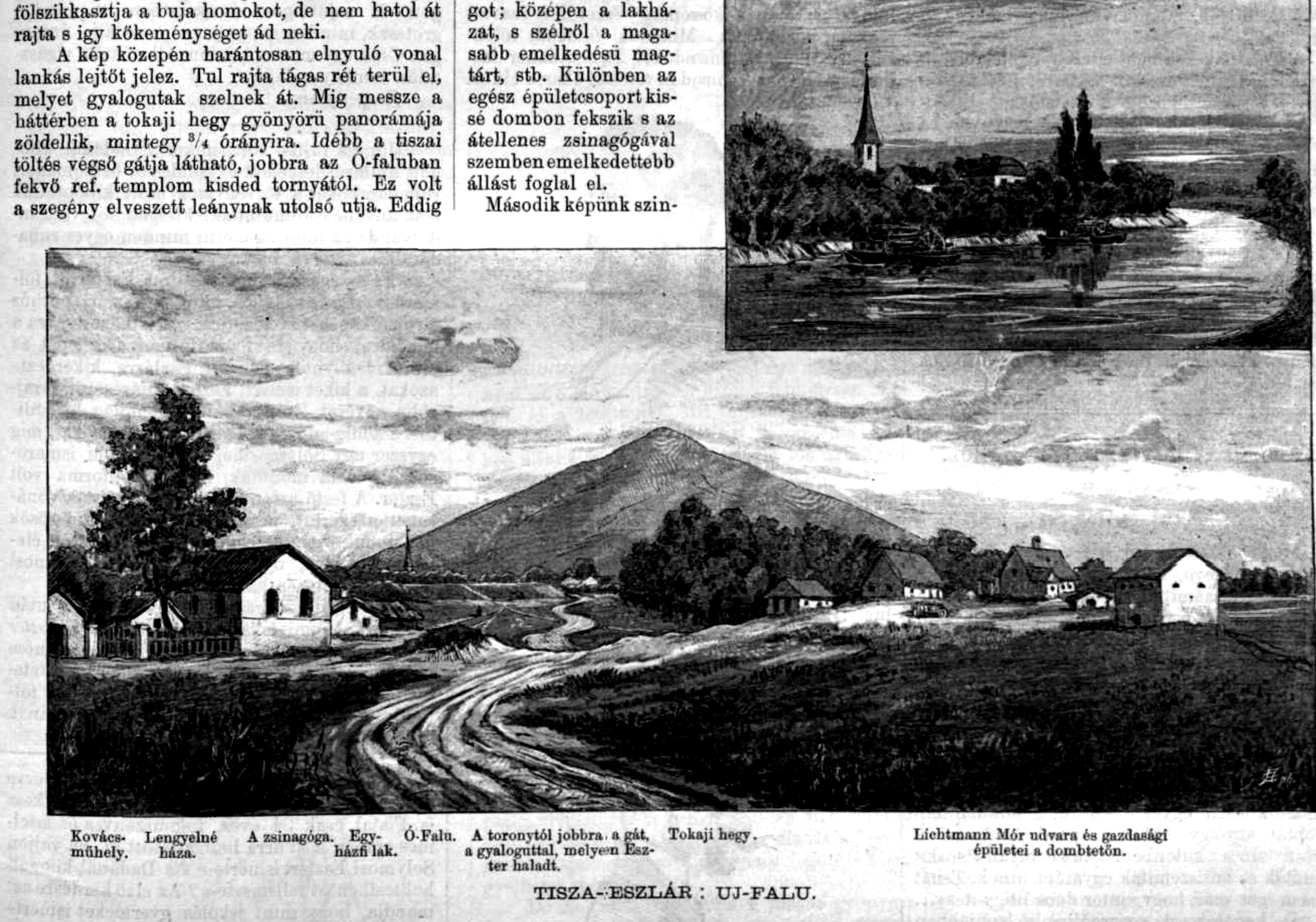 Vasárnapi Ujság Tiszaeszlári tudósításának illusztrációja 1883. 28.szám